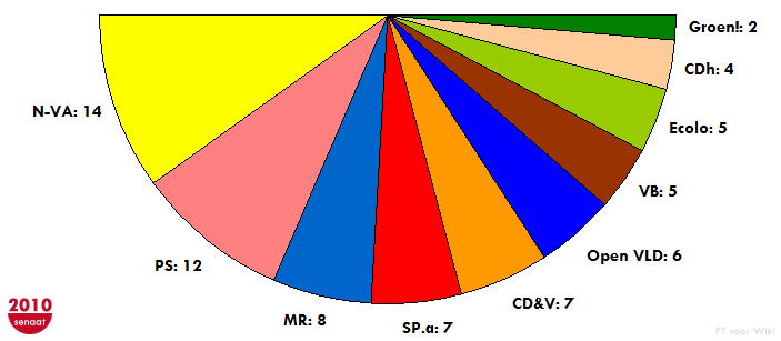 Inaugurale zetelverdeling van de Belgische Senaat (één van de twee federale parlementen) in 2010. Combinatie van rechtstreeks verkozen senatoren, gemeenschapssenatoren en gecoöpteerde senatoren. De apolitieke senatoren van rechtswege (koningskinderen) zijn niet opgenomen in dit overzicht.